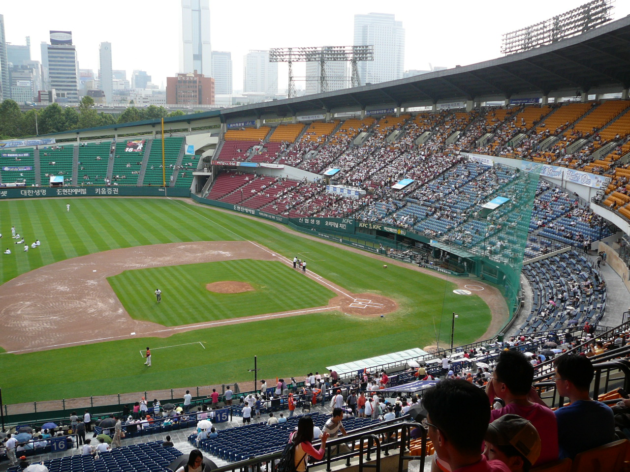 잠실 야구장 전경: 두산 대 한화 경기Jamsil Baseball Stadium: Doosan vs. Hanhwa